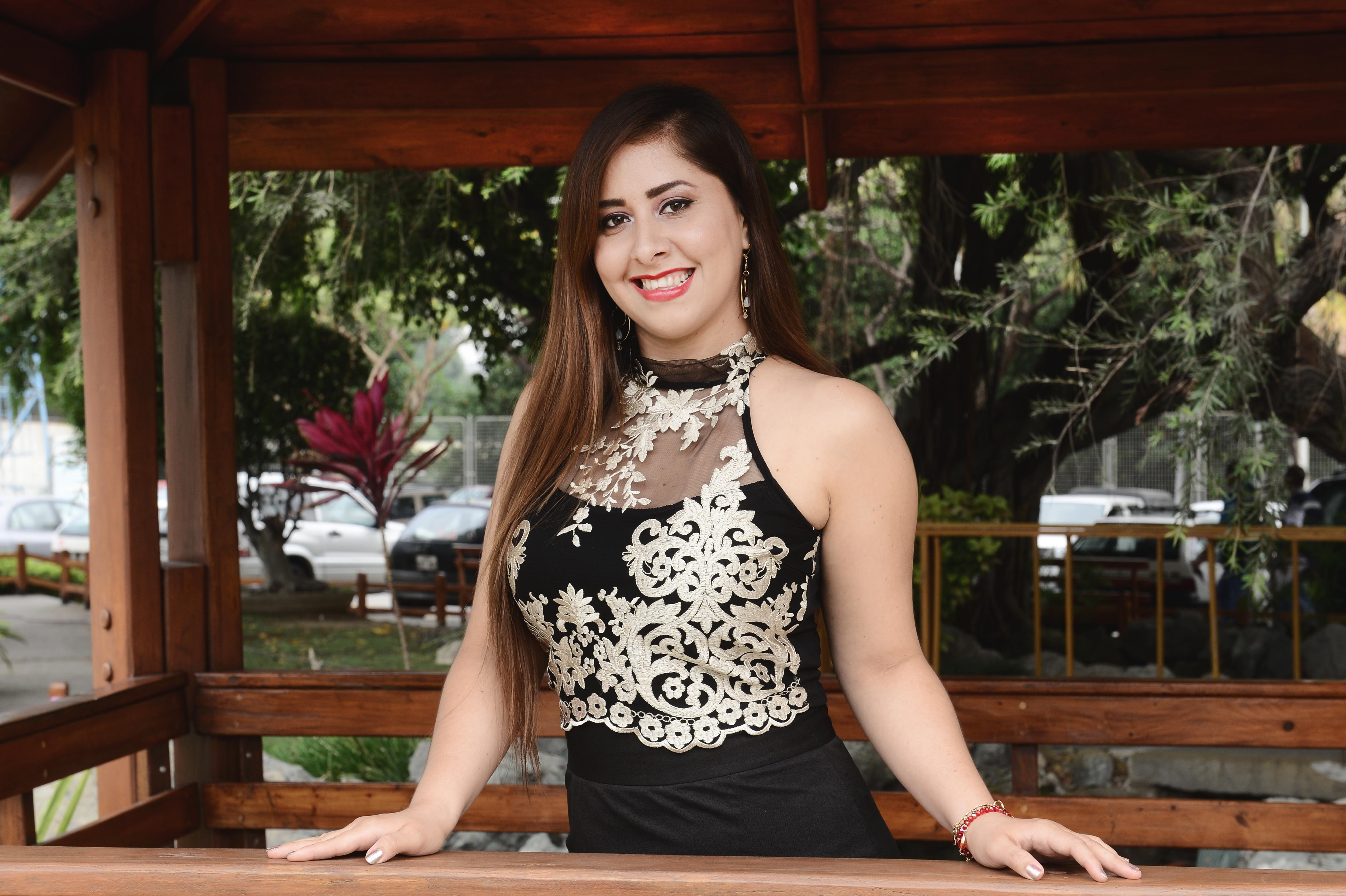 Sofía Rosado